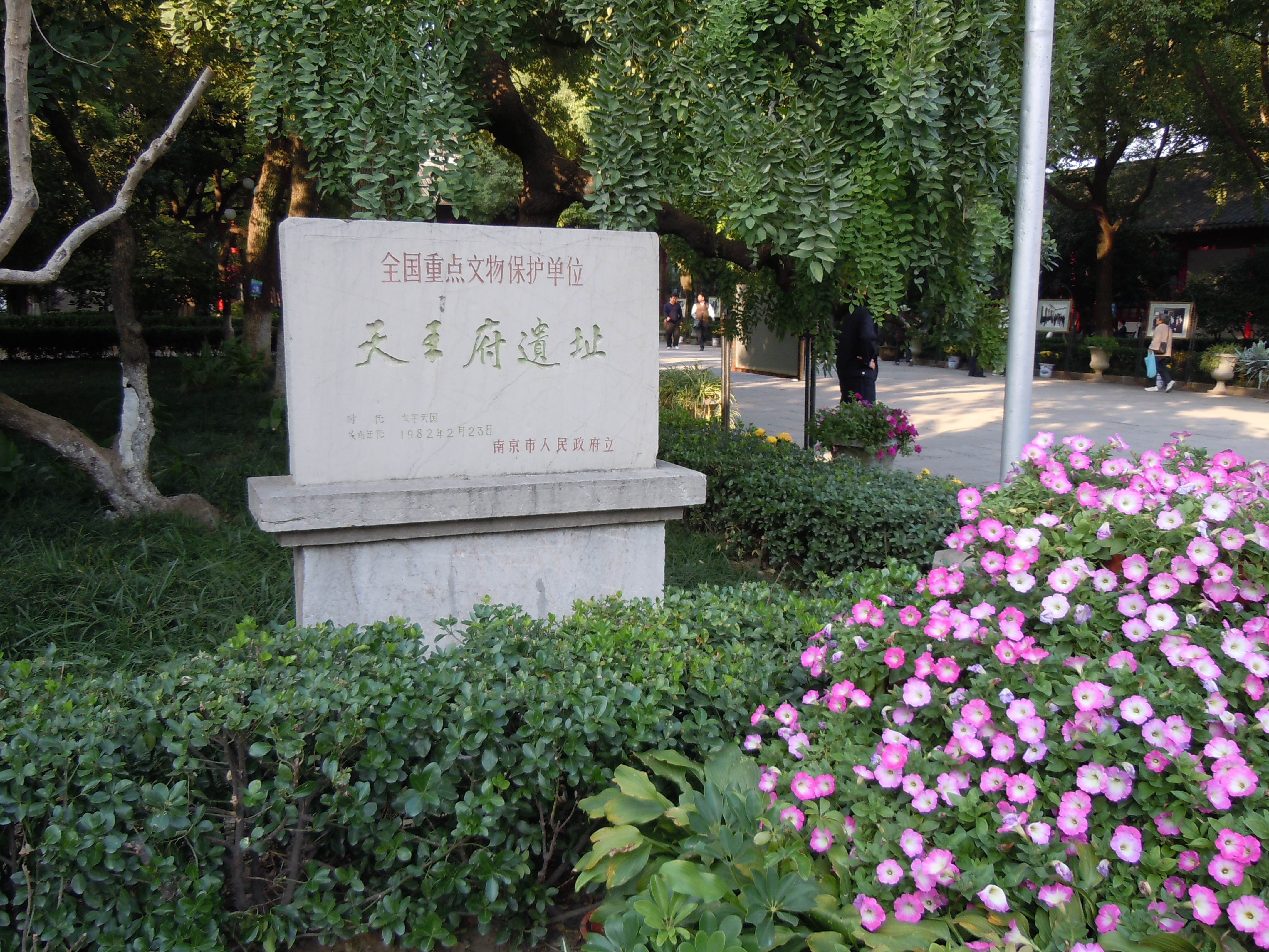 南京总统府内的太平天国天王府遗址标志